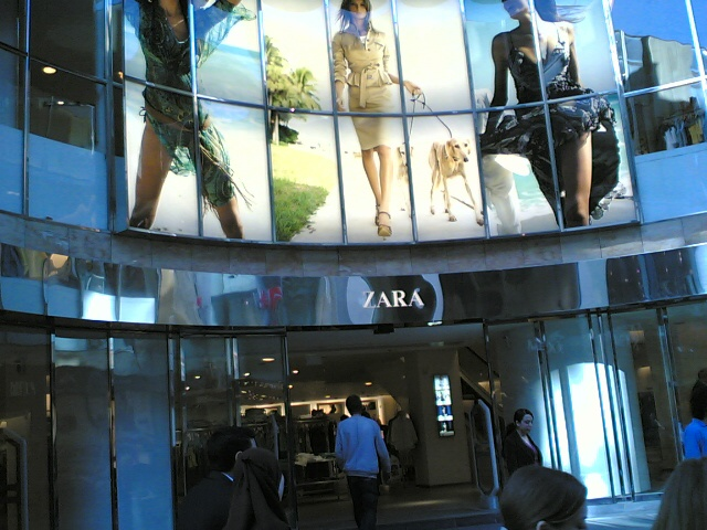 Zara, sí señó. Inditex rulez. También había Coronel Tapiocca, y, por supuesto, varias cadenas hoteleras.Zara en la Rue Neuve de Bruselas